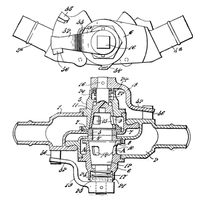 Pearson's Coupling - Side Elevation and Sectional Plan